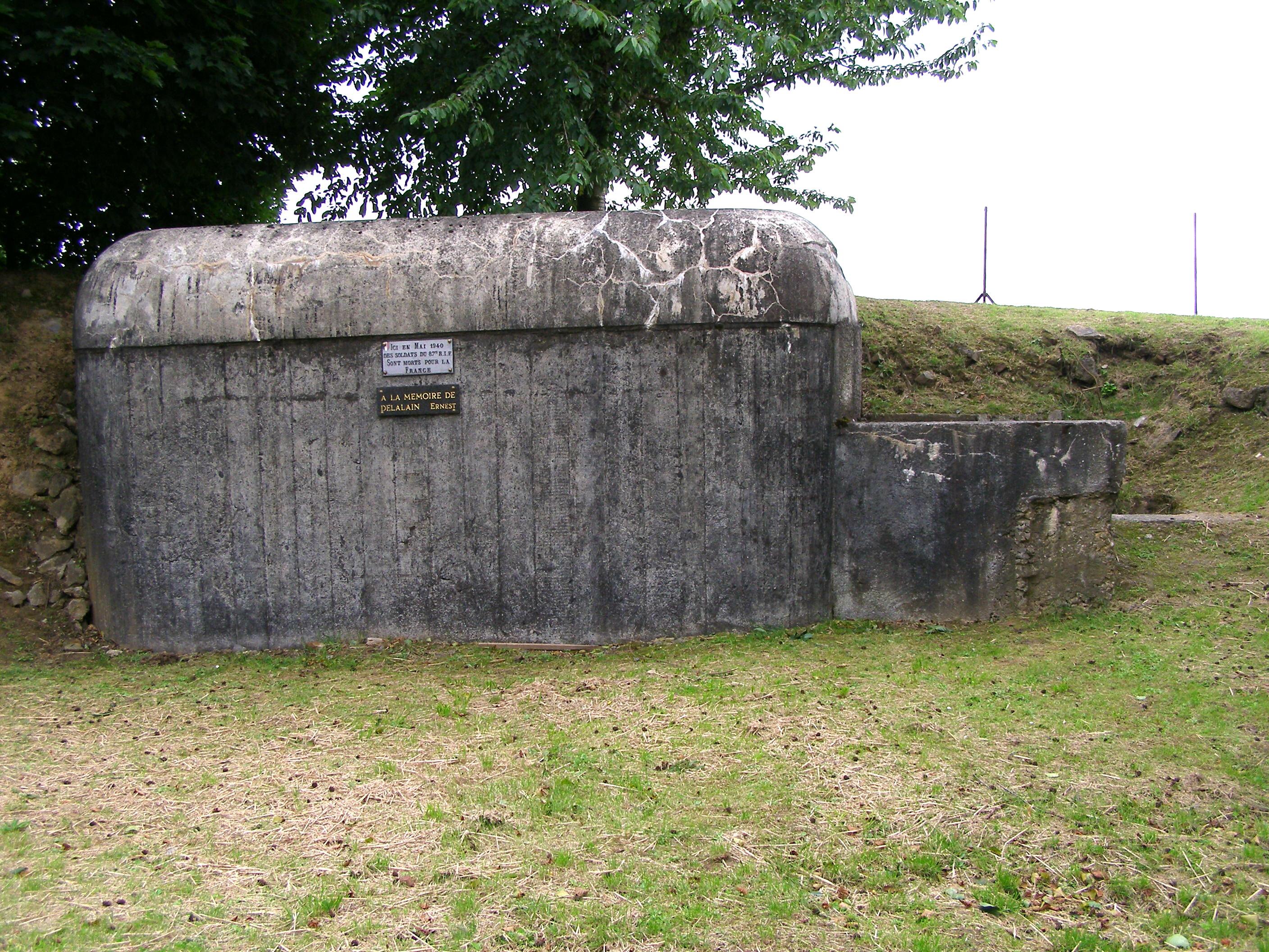 À la mémoire de Delalain Ernest.